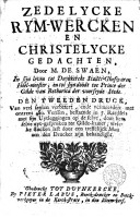 "Zedelycke rymwercken en Christelycke gedachten" door Michiel de Swaen, uitgegeven door y Pieter Labus in 1722